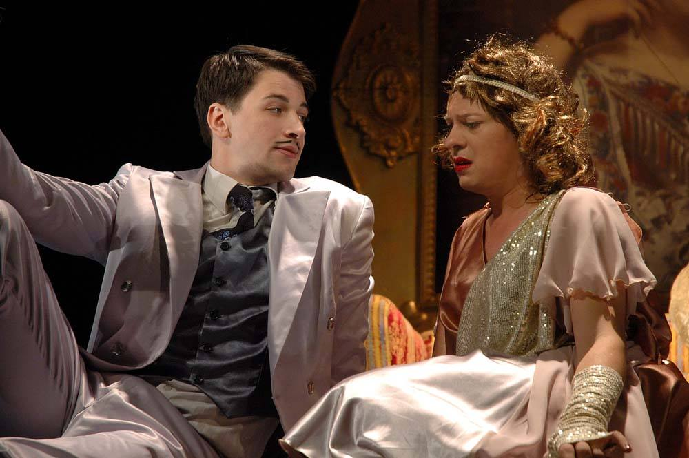 Српски (ћирилица): Сцене са премијере позоришне представе "Госпођа Министарка" у извођењу ансамбла позоришта Бошко Буха. На слици Горан Јевтић и Виктор Савић.